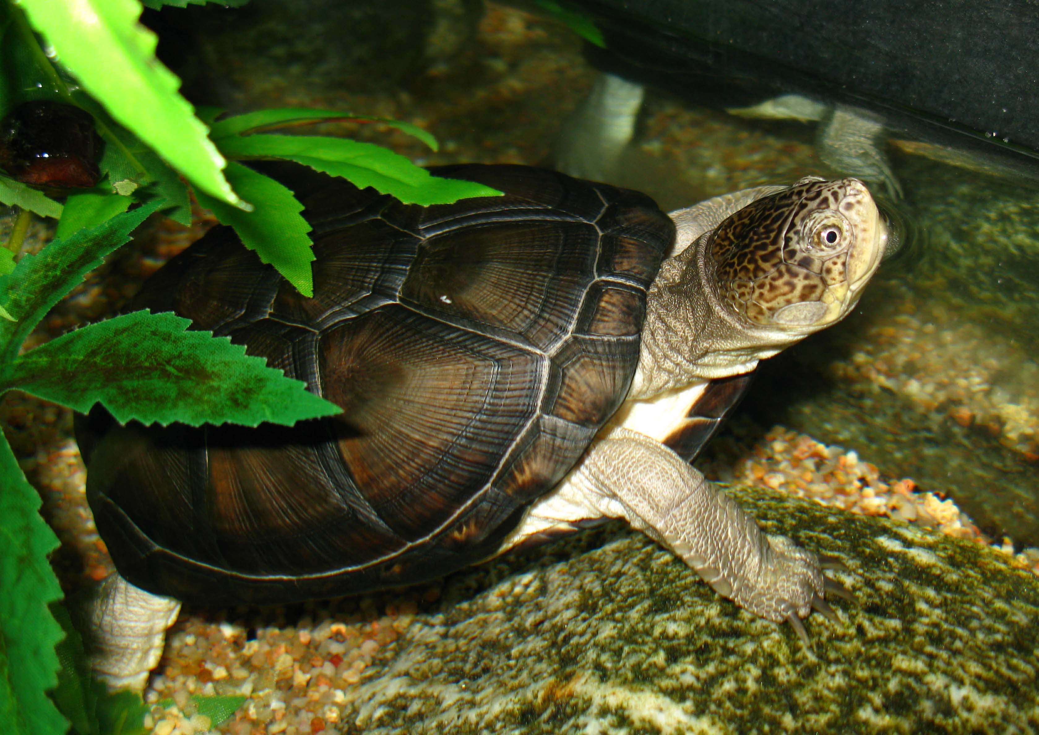 Pelusios castaneus, African mud turtle.